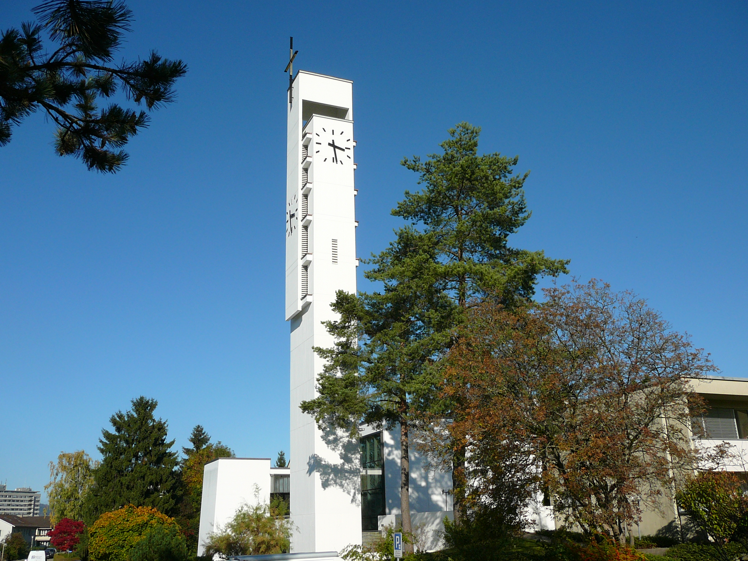 Römisch-katholische Pfarrkirche Bruder Klaus Urdorf, Aussenansicht